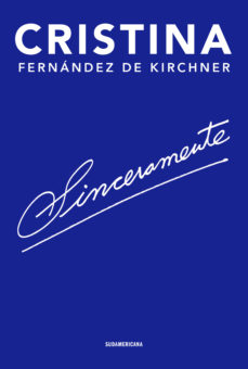 Tapa del libro de Cristina Fernández de kirchner, Sinceramente. This is a retouched picture, which means that it has been digitally altered from its original version. Modifications made by Bauty Aguirre.